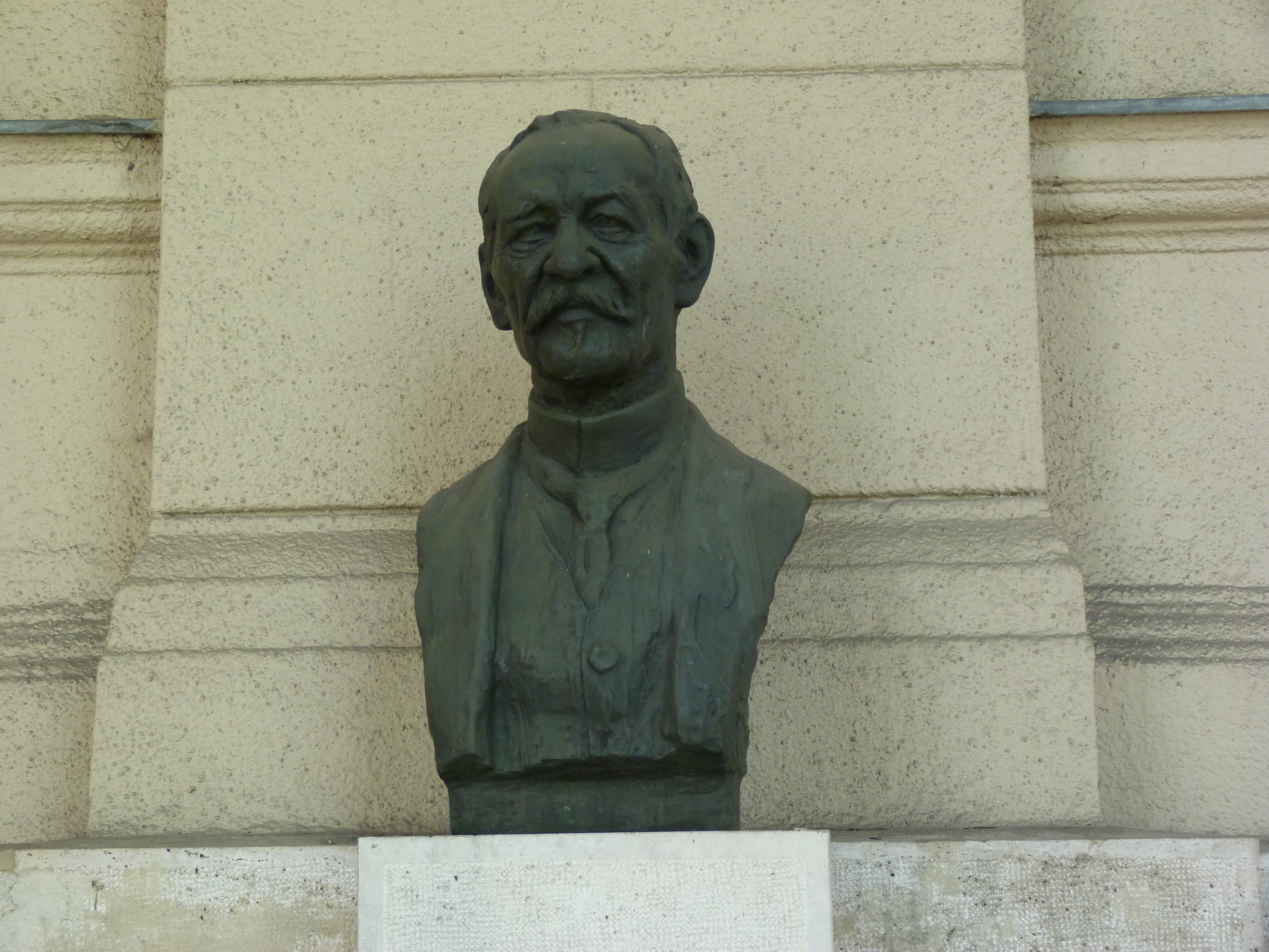 A felvétel 2012. május 19 -én készült Budapesten. Mathiasz János mellszobra a Kossuth téren, a Mezőgazdasági és Vidékfejlesztési Minisztérium falánál